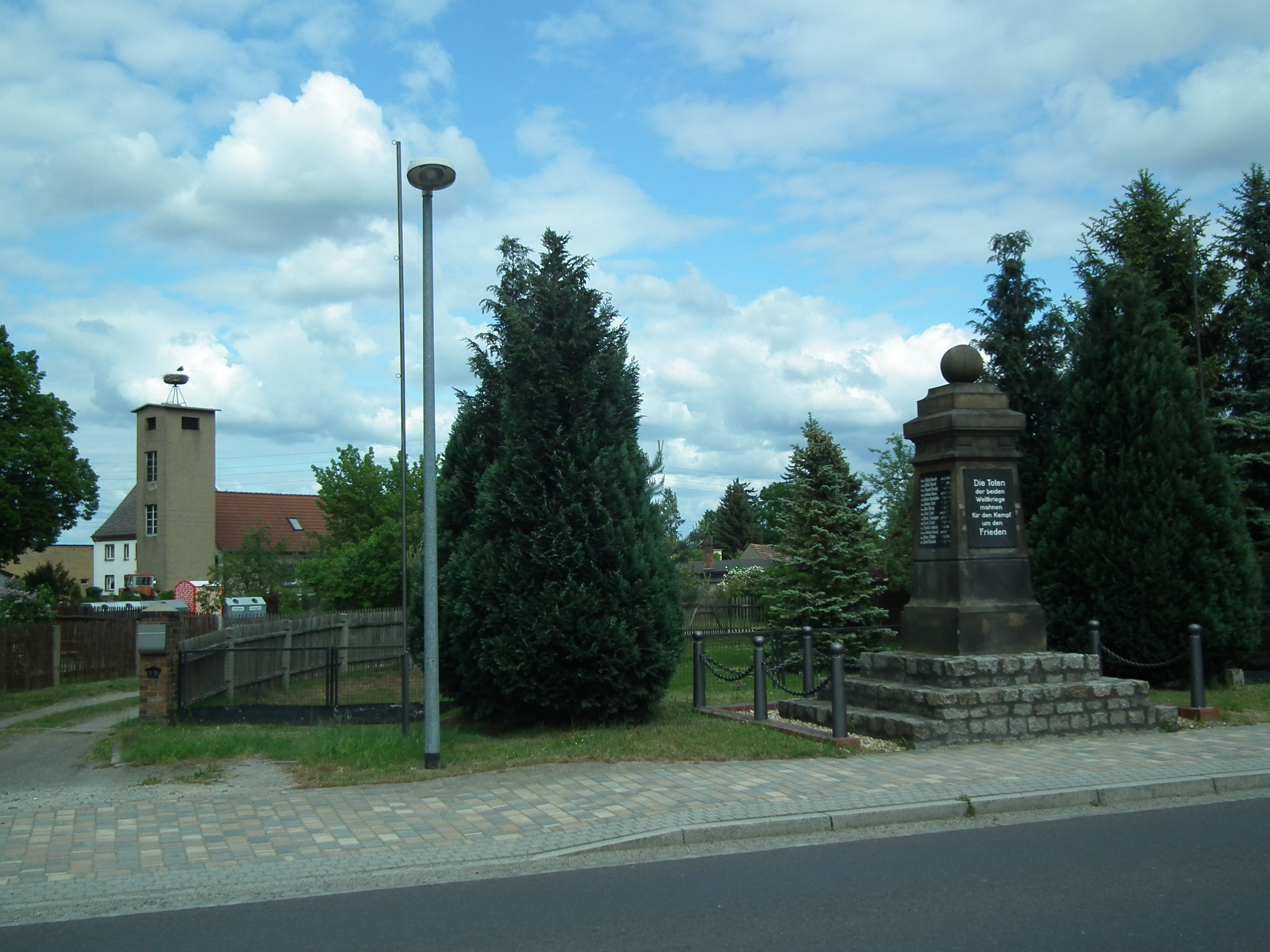 Weißkeißel